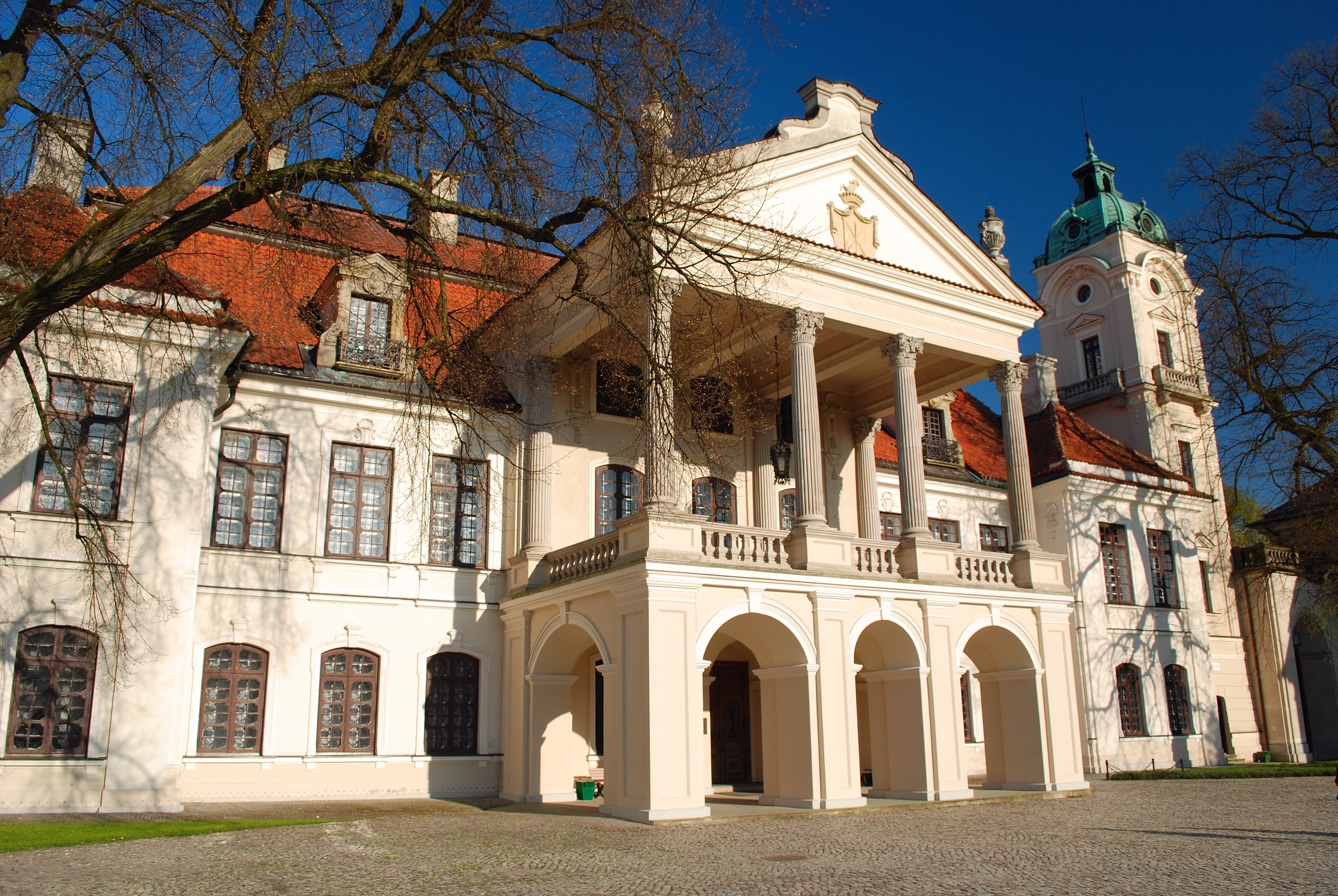 Pałac Zamoyskich w Kozłówce